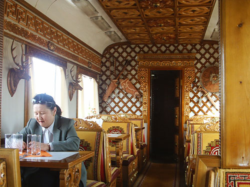 Mongolian dining car.